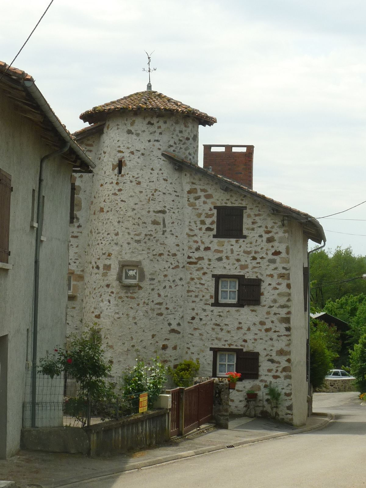 maison restaurée à Lésignac, St-Maurice-des-Lions, Charente, France